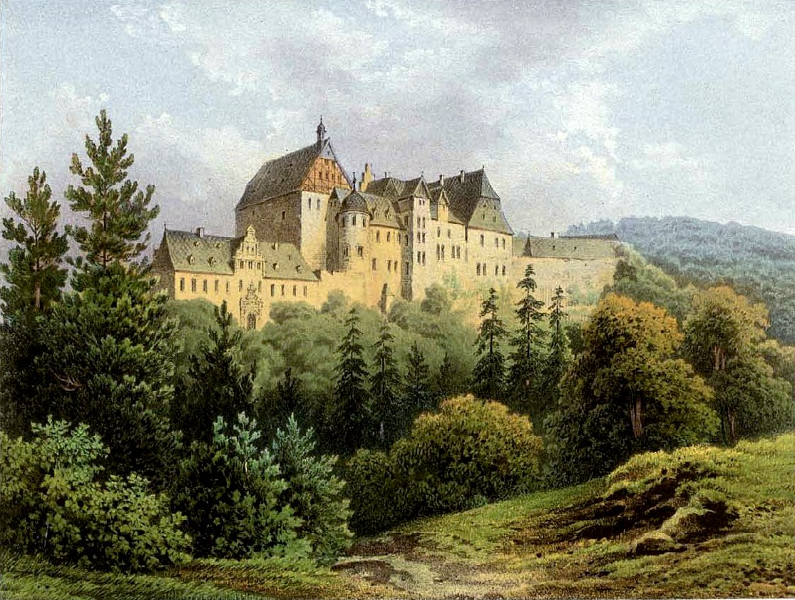 Schloss Beichlingen, Lithografie aus dem 19. Jahrhundert